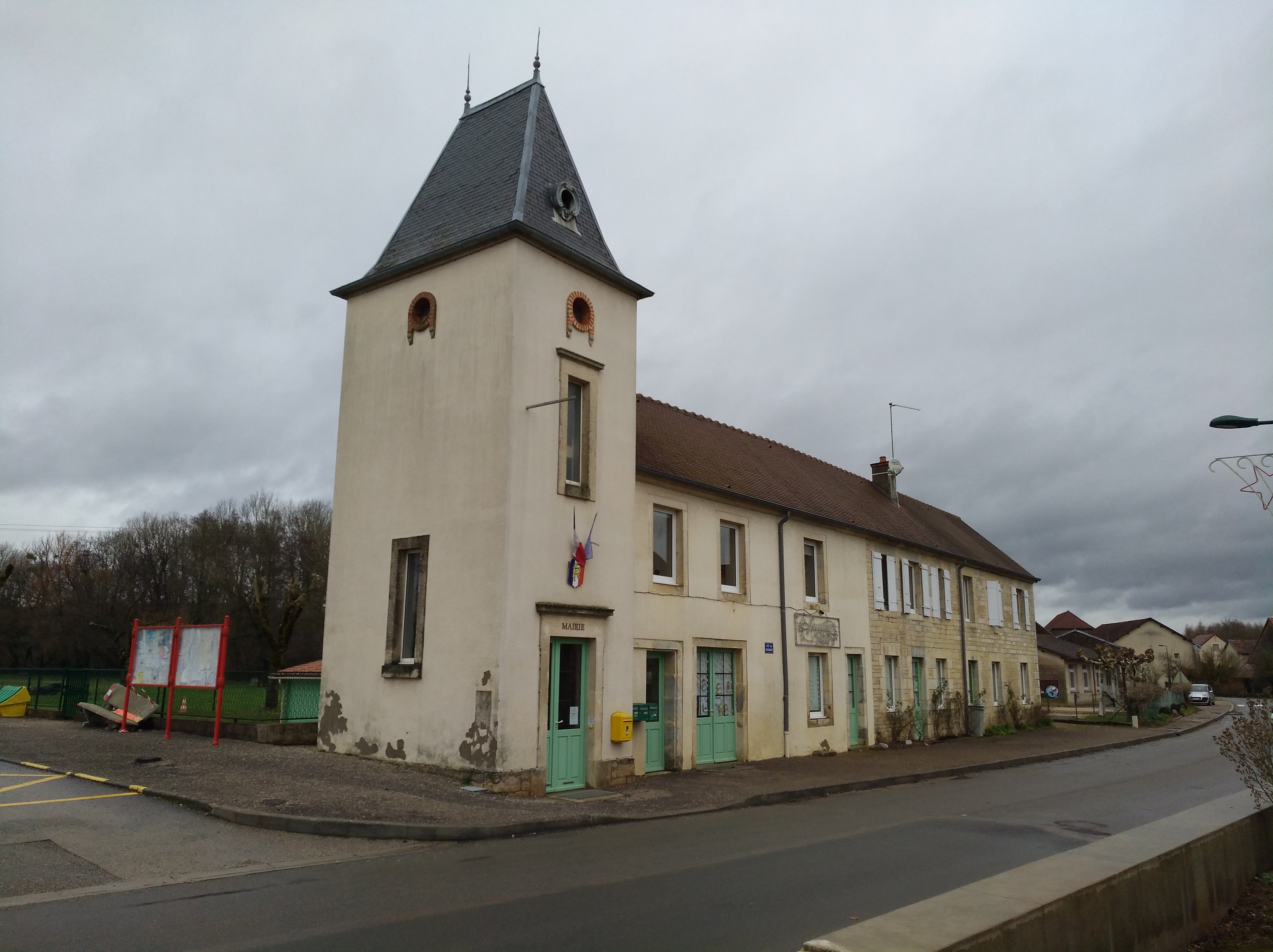 Châtenois (Jura, France) en janvier 2018.